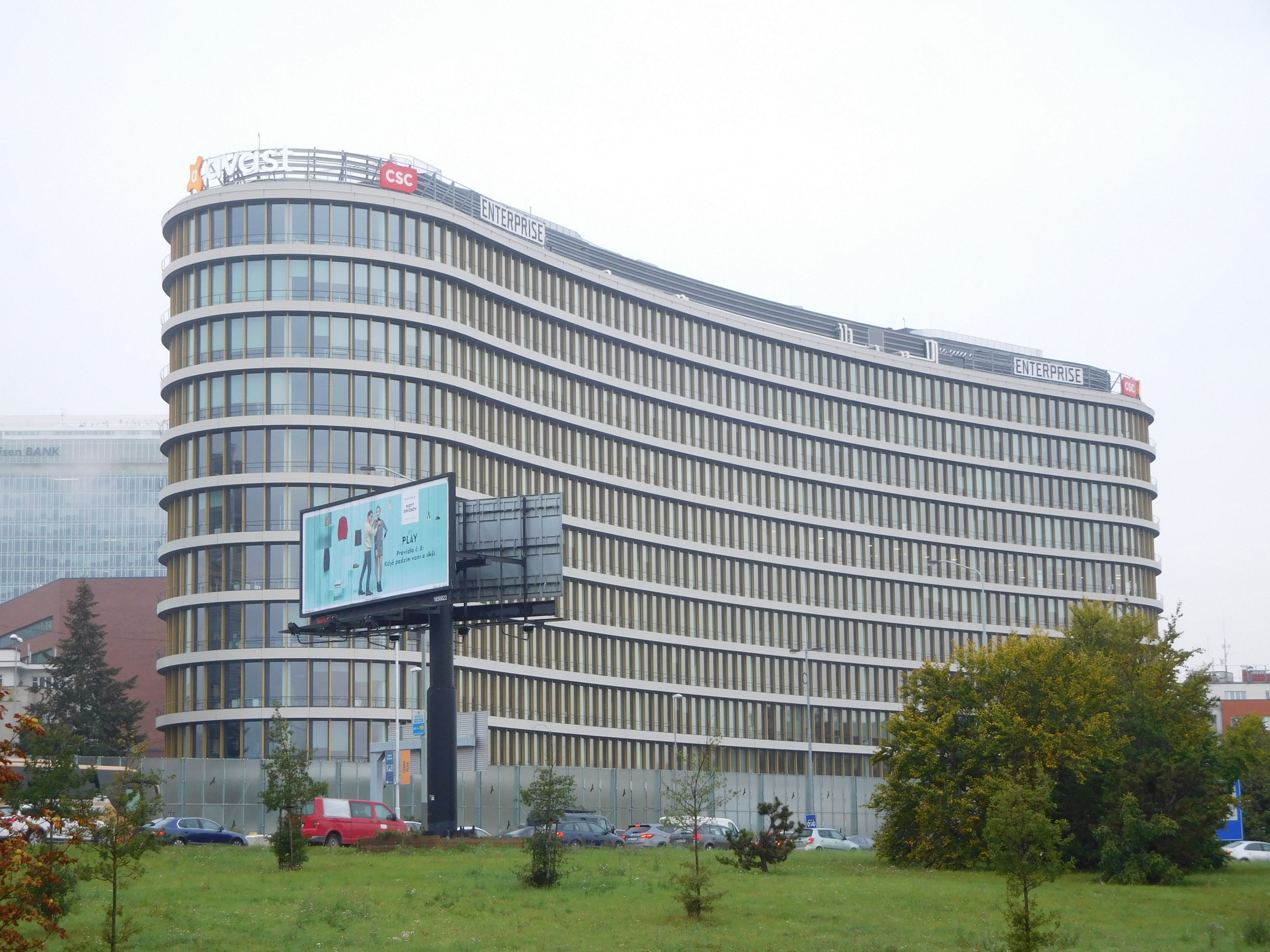 Enterprise Office Center; Praha - Nusle, Pikrtova 1a